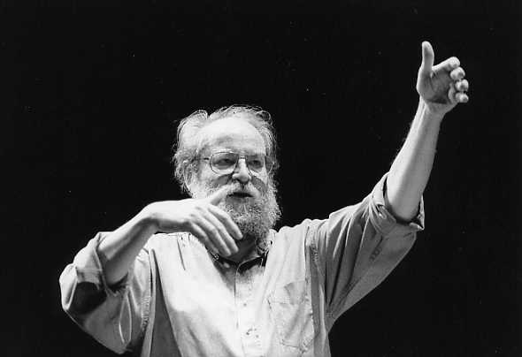 JPSSD